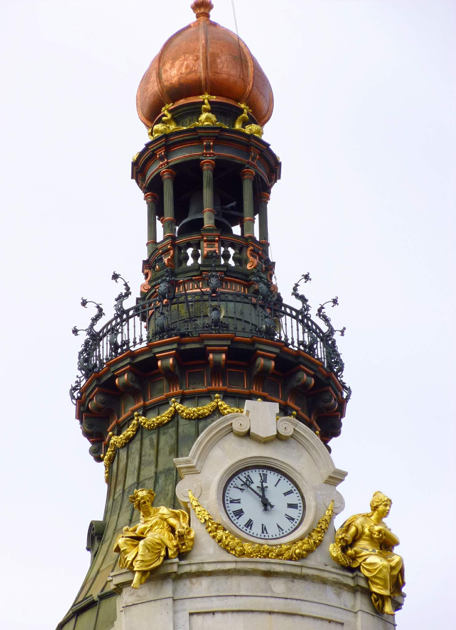 Palacio de la Equitativa (Edificio Banesto), en Madrid